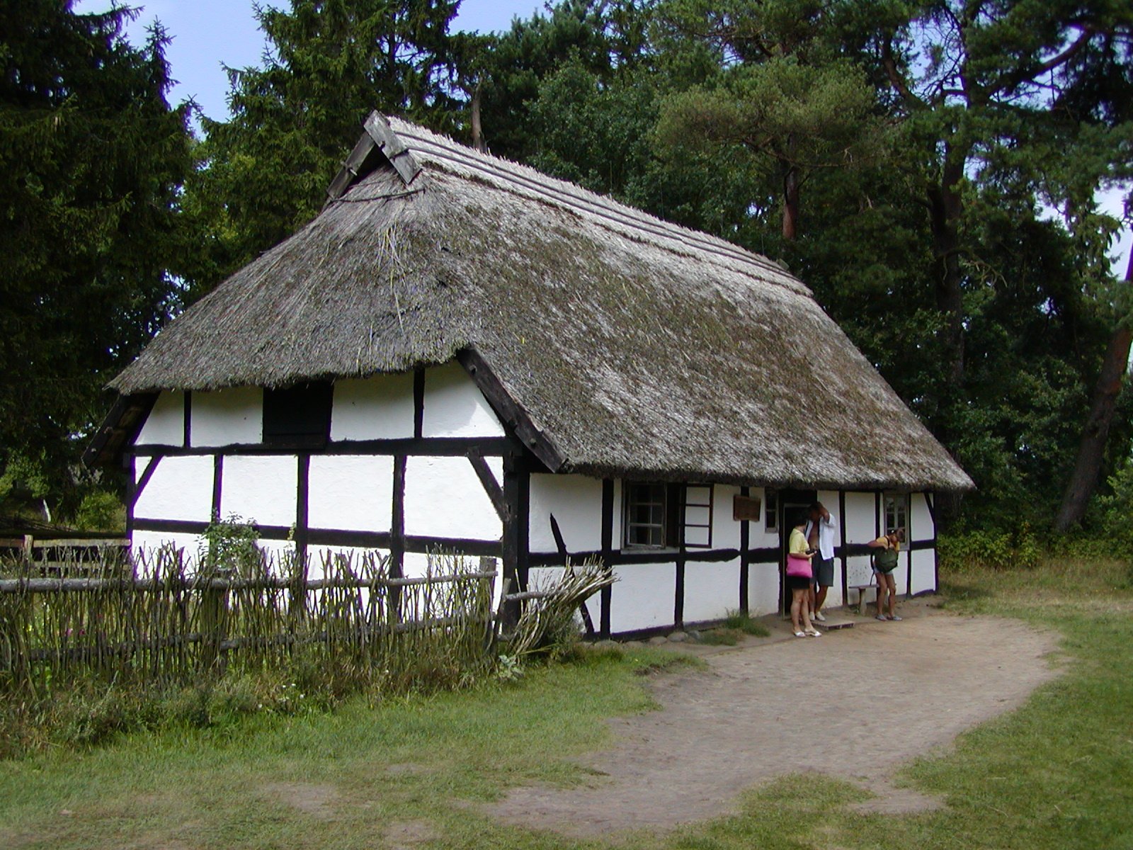 Kluki, Poland Muzeum Wsi Słowińskiej. Chałupa Charlotty Klick z Kluk Smołdzińskich, koniec XVIII wieku, rozbudowana w II połowie XIX wieku.